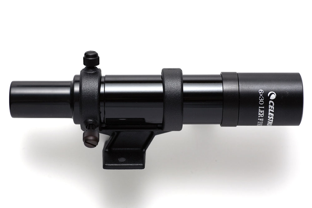 einfaches Zielfernrohr für ein Amateurteleskop --Kapege.de 14:49, 6 January 2007 (UTC)